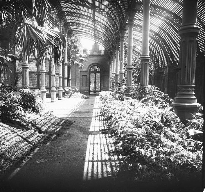 Fotografia de l'Umbracle del Parc de la Ciutadella de Barcelona, feta per Josep Salvany l'any 1922